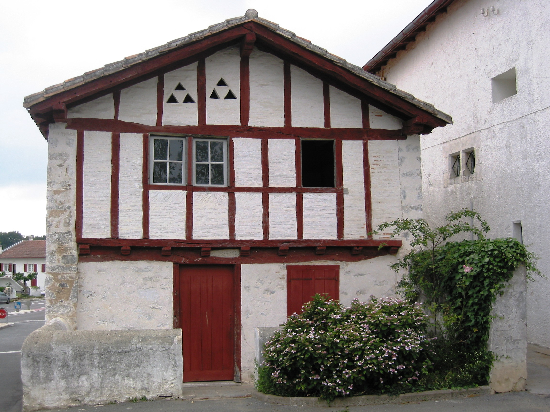 Arbonne (France), photo de la Benoîterie prise le 03/06/05 par Harrieta171